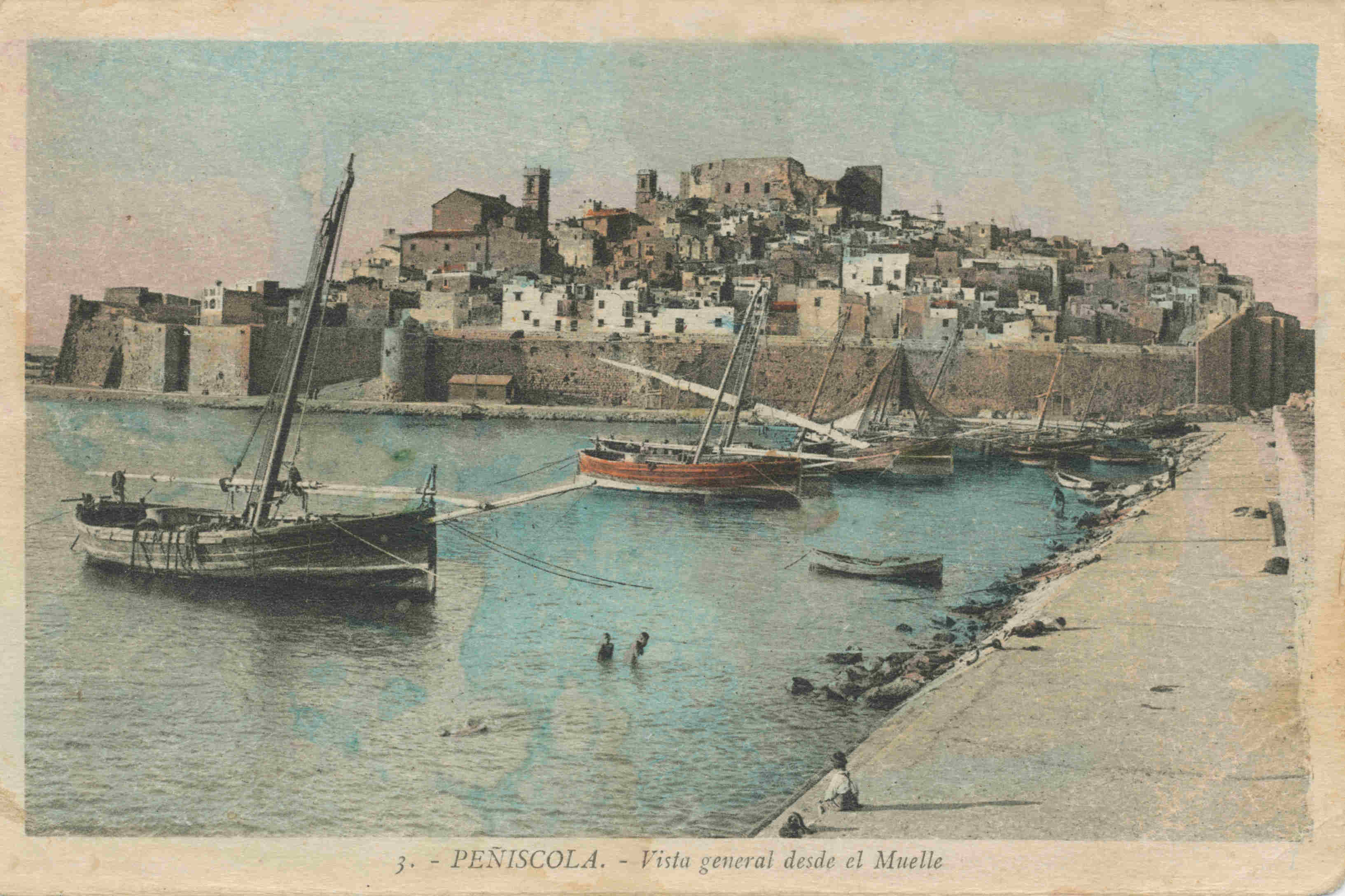 Peñiscola - port (vers 1930).